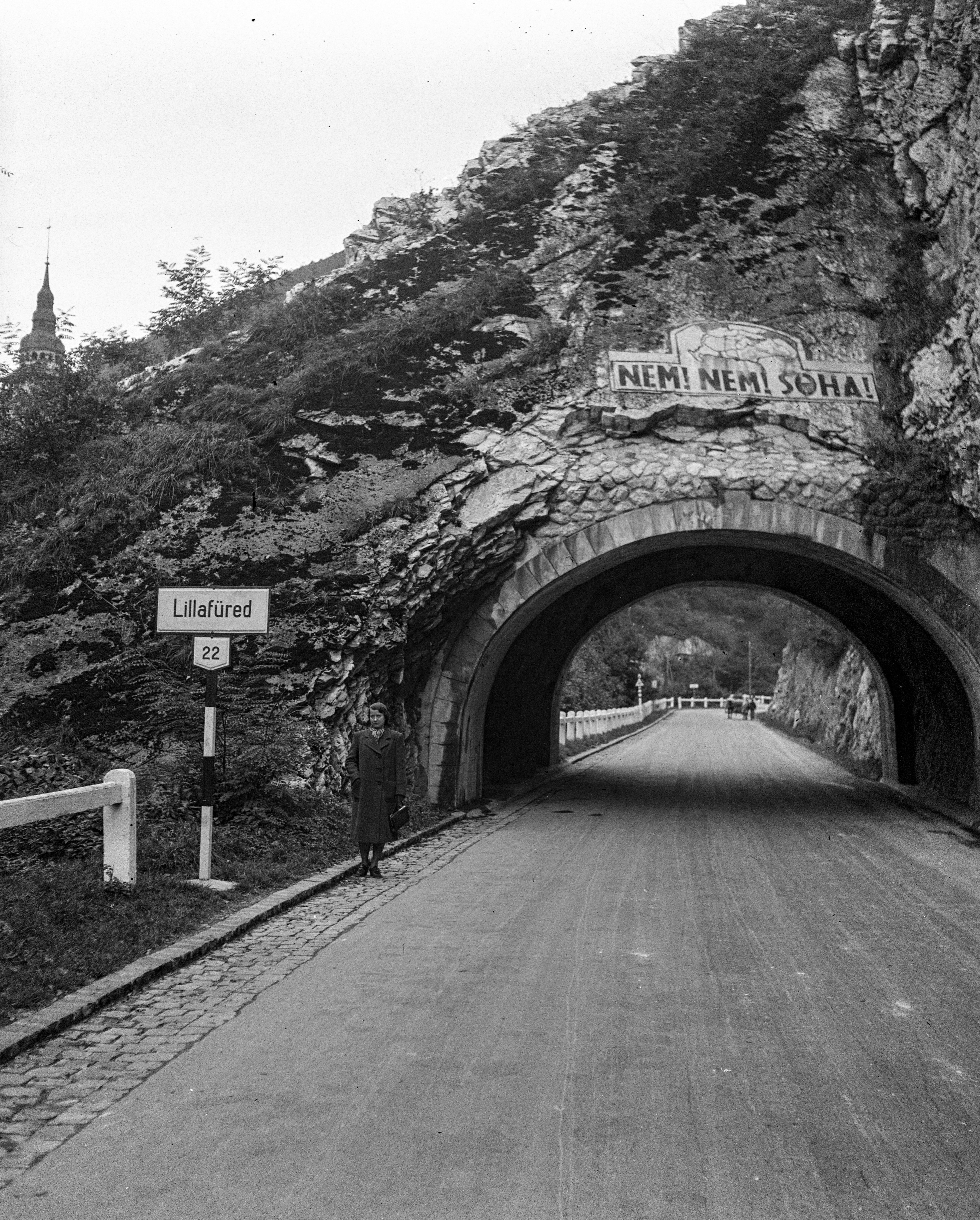 Vadas Jenő utca, alagút, a Palotaszálló felé nézve. Location: Hungary Tags: label, road signs, tunnel, portrait, lady, coat, handbag, place-name signs Title: Vadas Jenő utca, alagút, a Palotaszálló felé nézve.